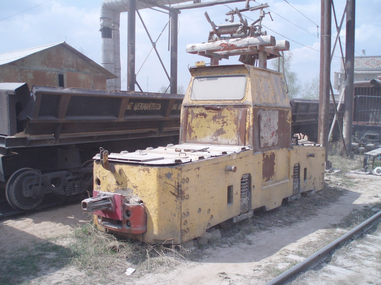 Электровоз К14М- Тверского кобината строительных материалов № 2